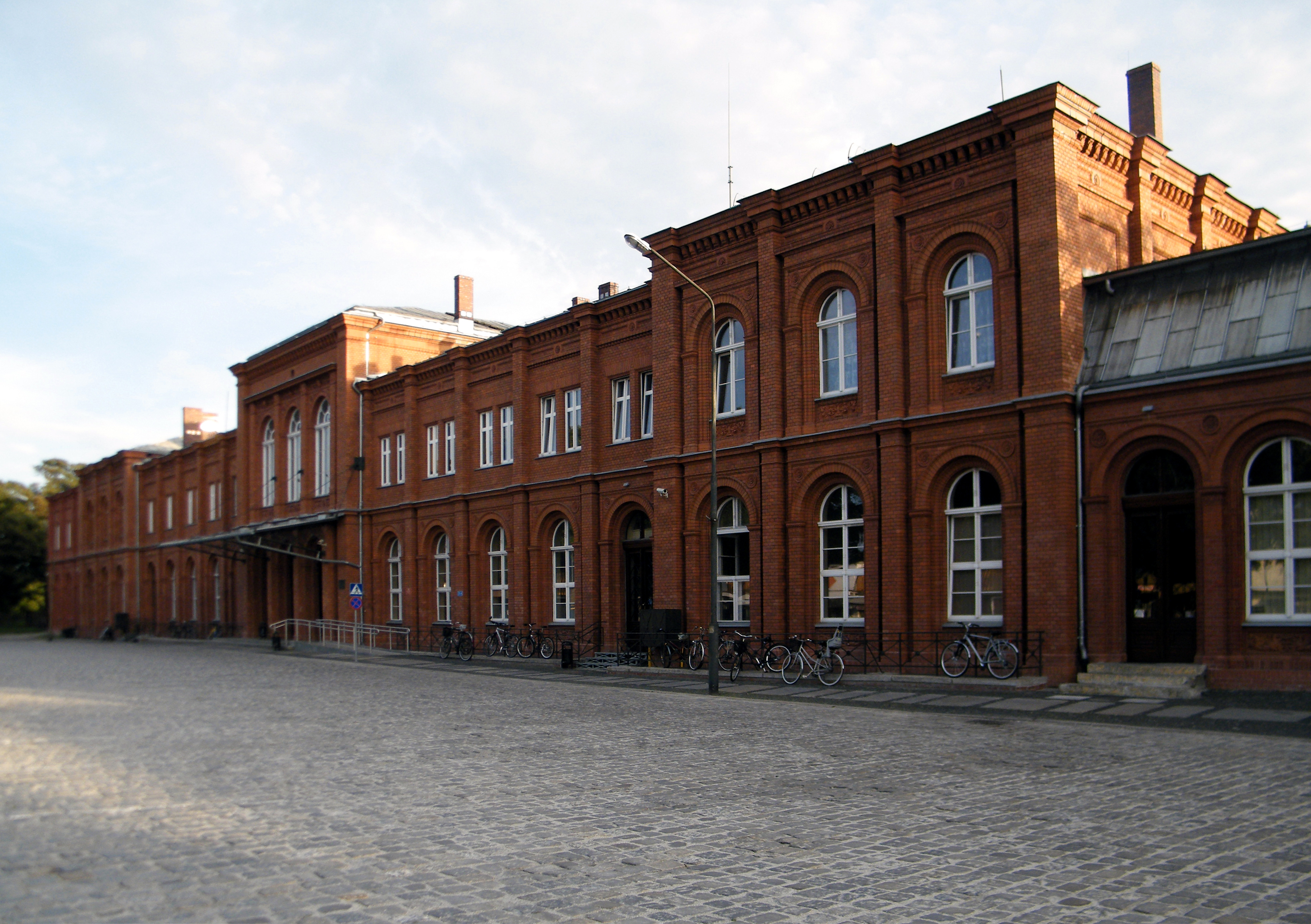 zespół dworca kolejowego: Brzeg, pl. Dworcowy